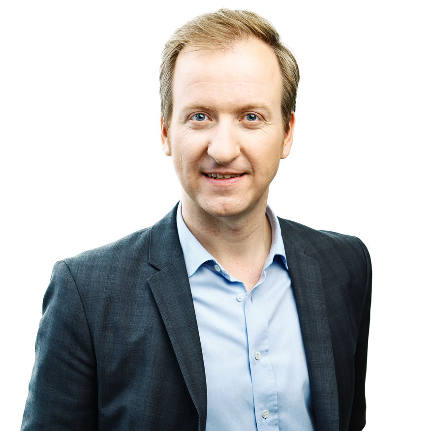 Photo credits: Rainer Christian Kurzeder